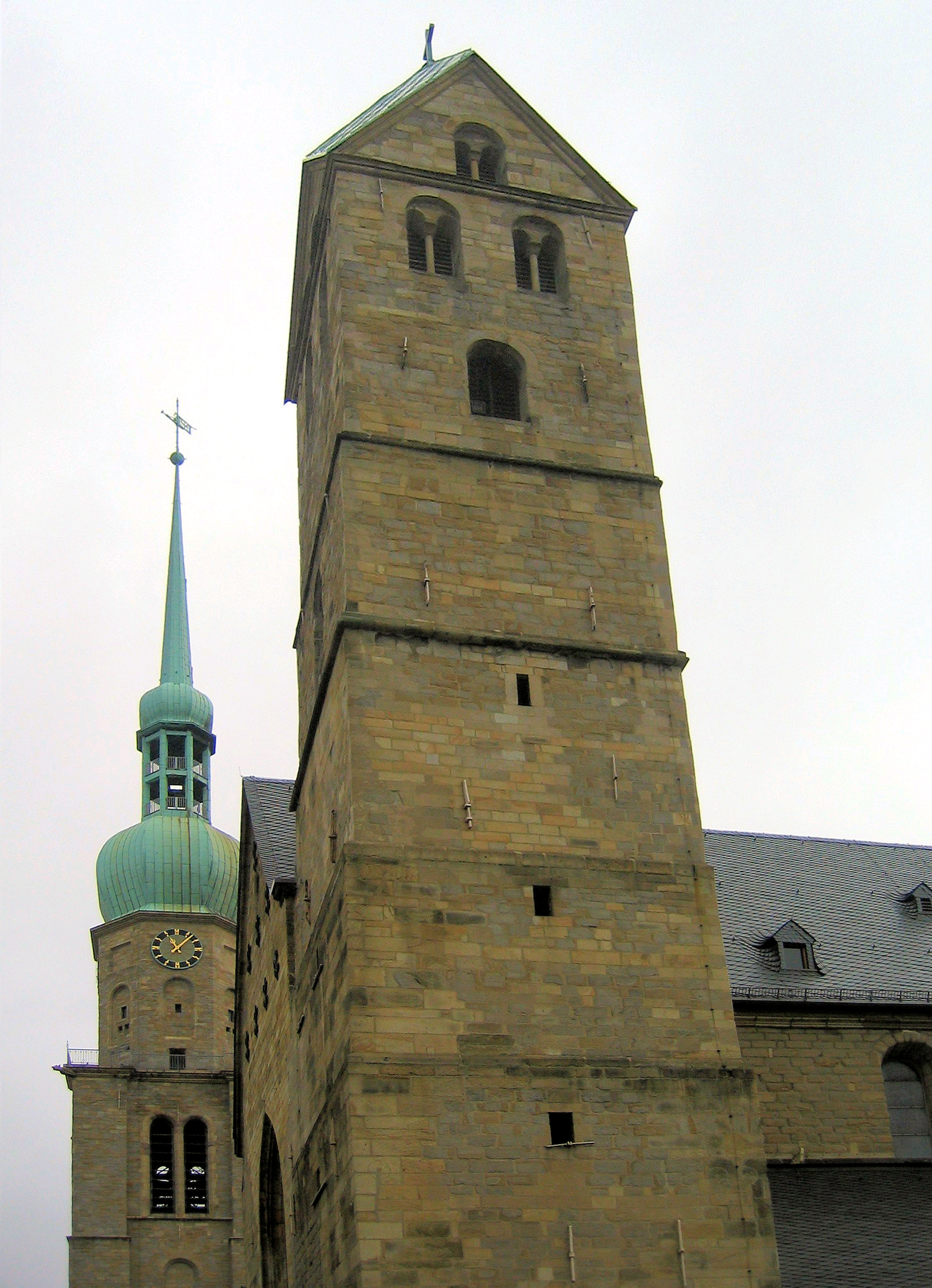 Kirchturm St. Marien (Dortmund) rechts, St. Reinoldi (Dortmund) links hinten